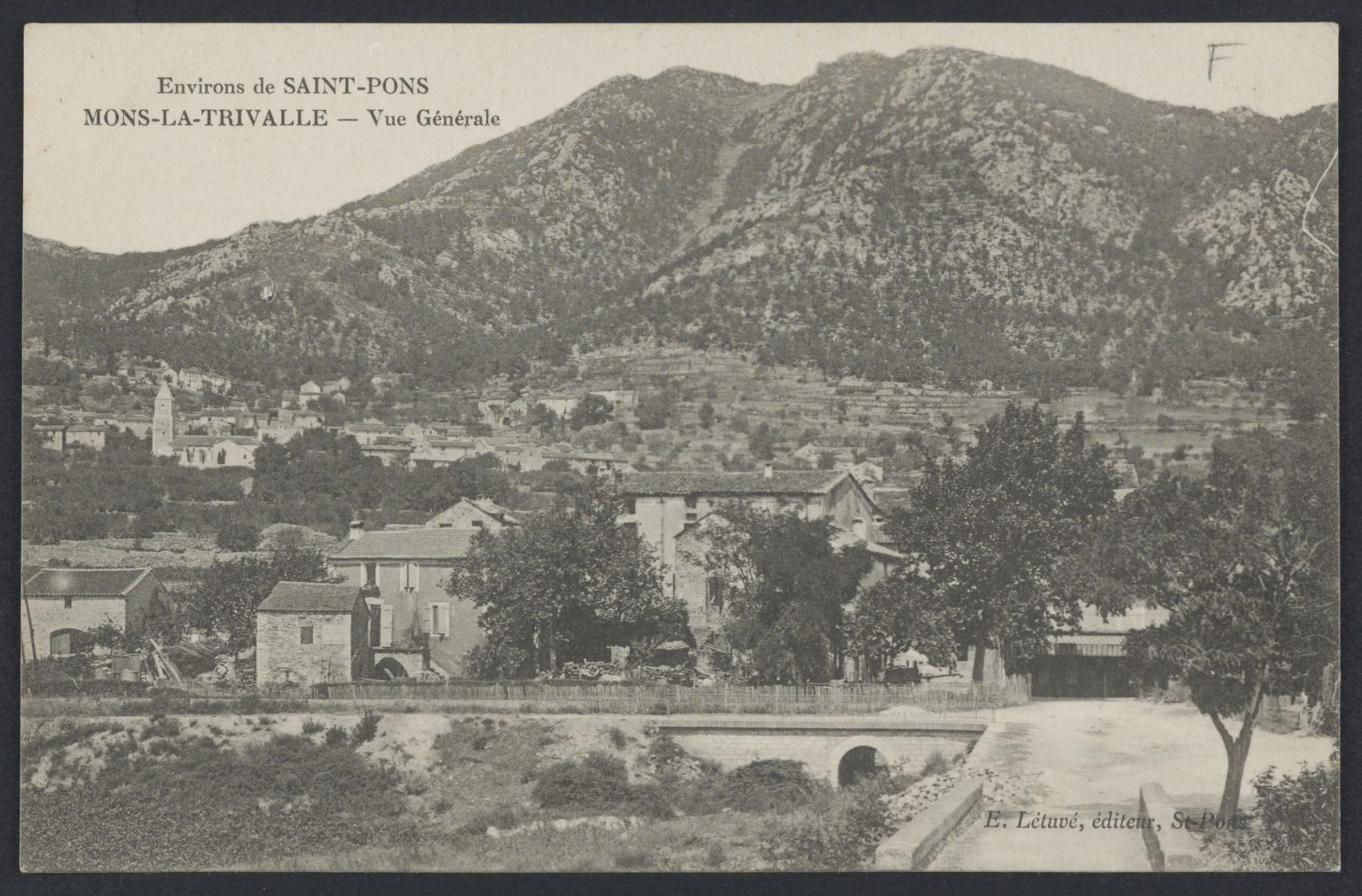 Mons-la-Trivalle. - Vue générale : carte postale.